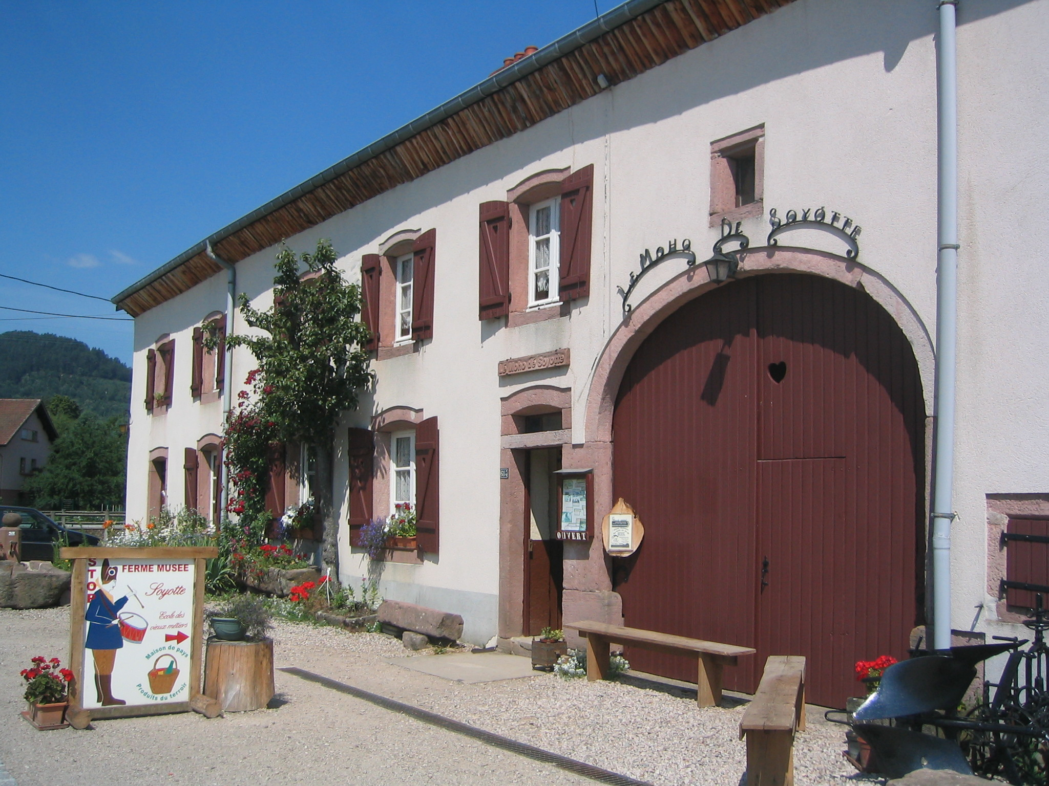 Ferme-musée de la Soyotte (commune de Sainte-Marguerite, près de Saint-Dié-des-Vosges) : traditions populaires et vieux métiers dans les Vosges